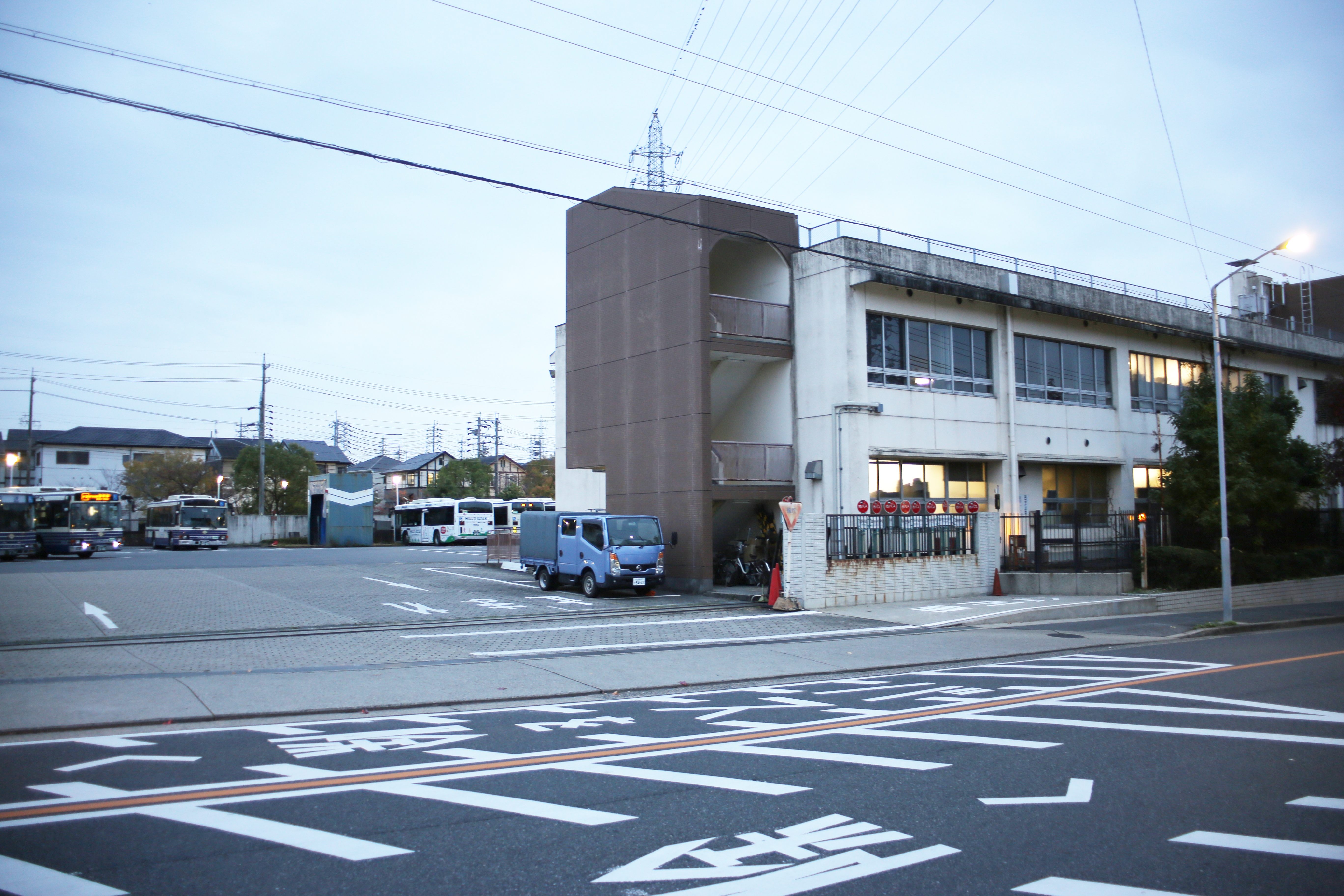 名古屋市緑区兵庫一丁目の名古屋市営バス緑営業所を北側公道より撮影。ただし、Photoshop Elementsにより、画像修整済。